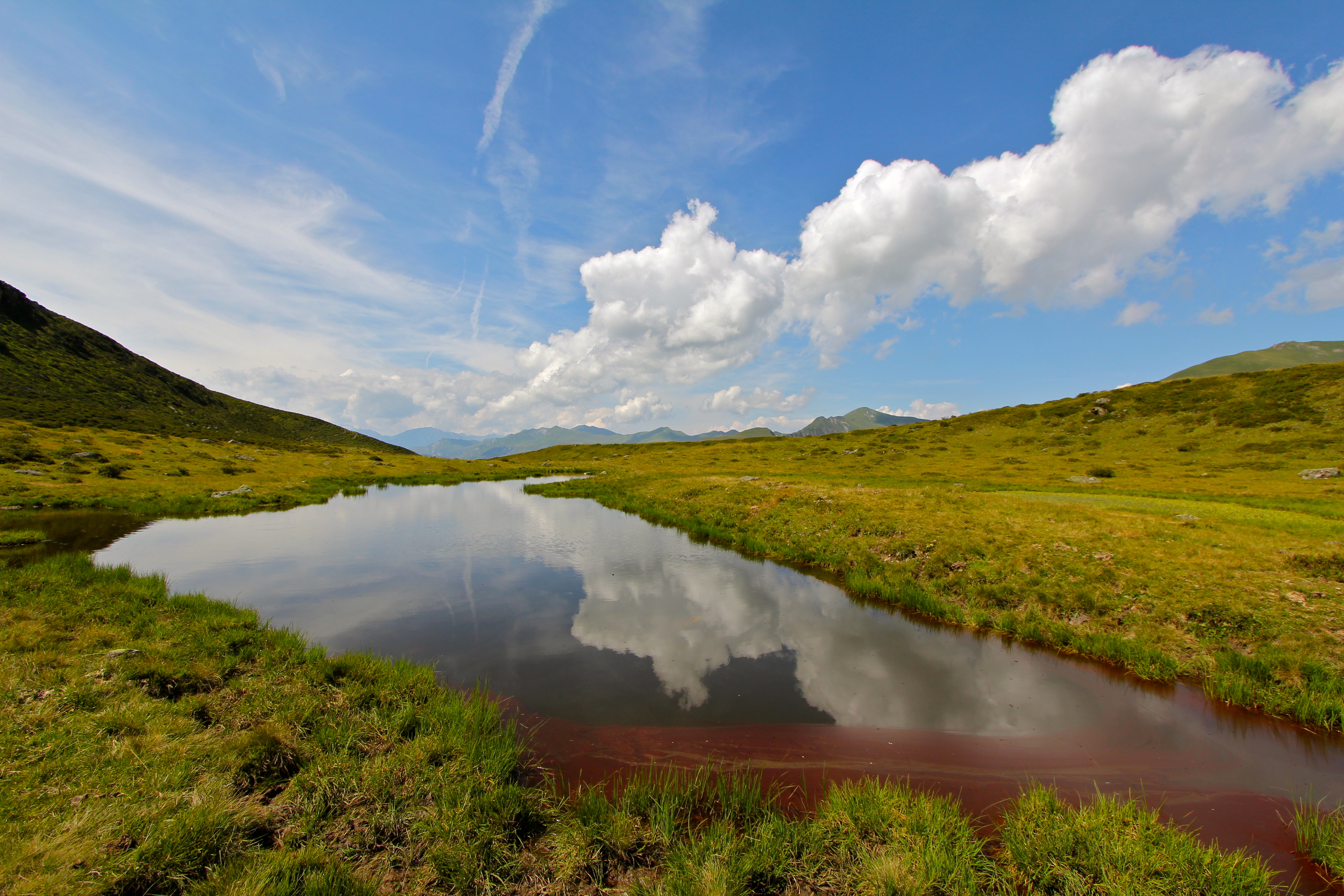 Bergseelein ob Medergen